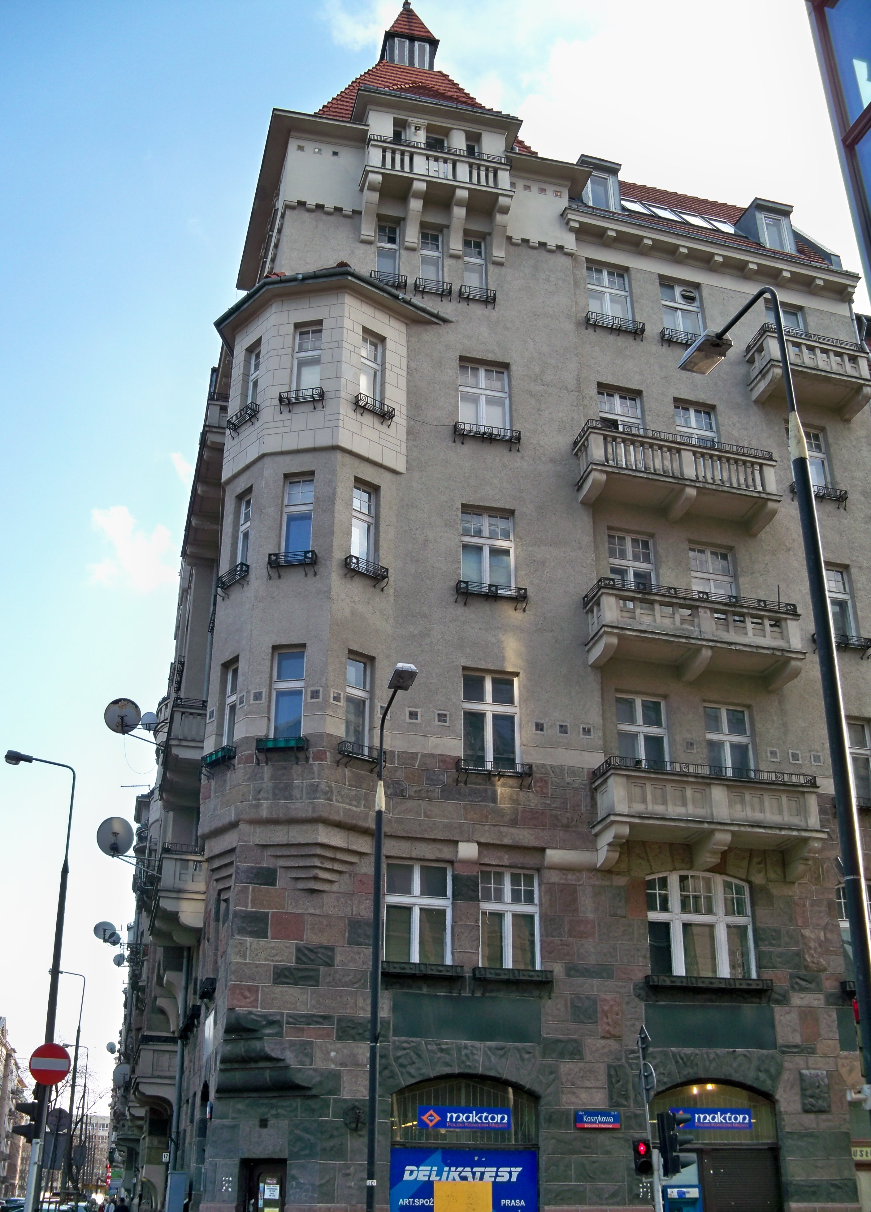 Kamienica na rogu ul. Lwowskiej i Koszykowej w Warszawie.